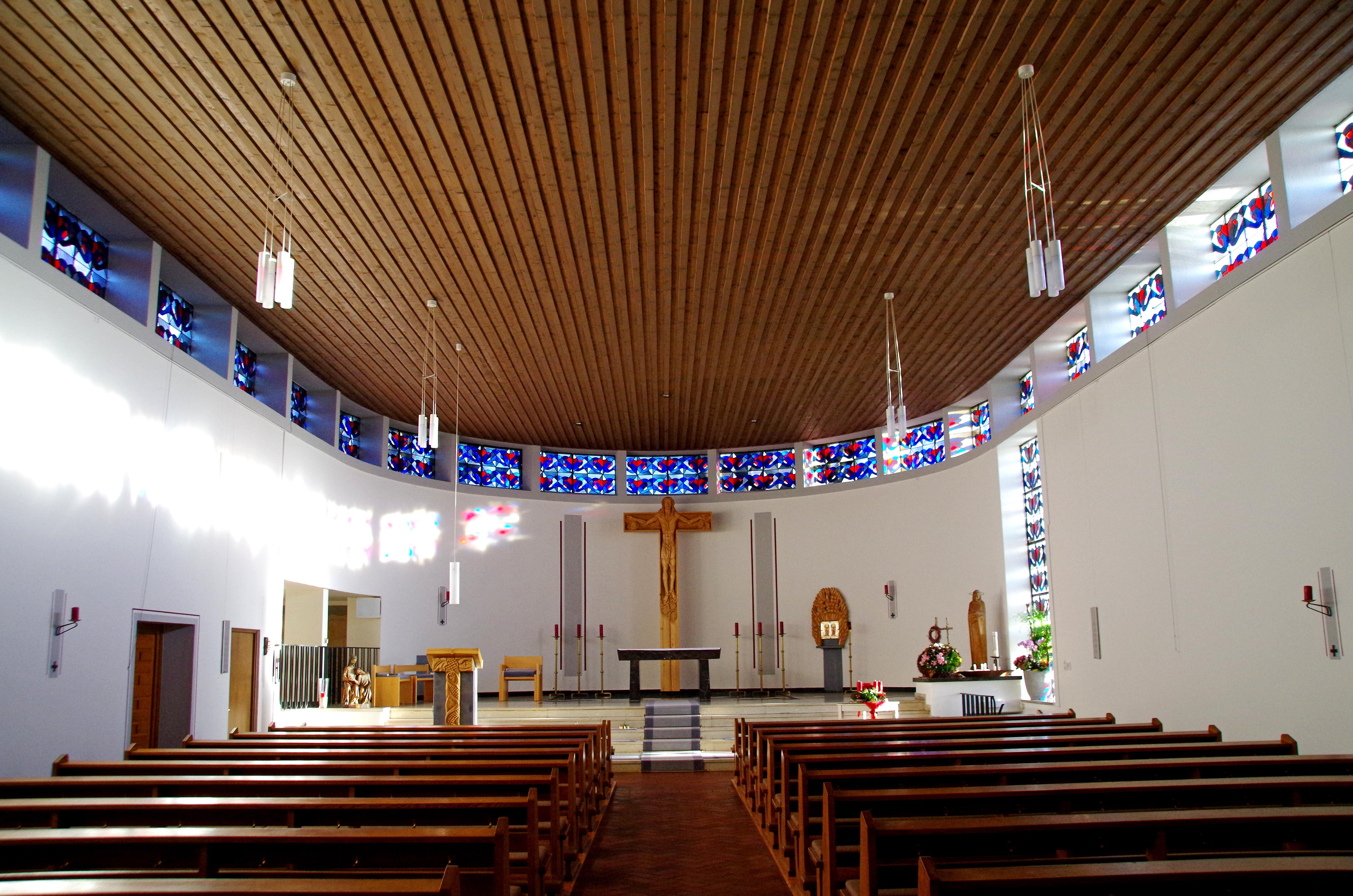 St. Mariä Empfängnis (Rollesbroich), Blick ins Kirchenschiff